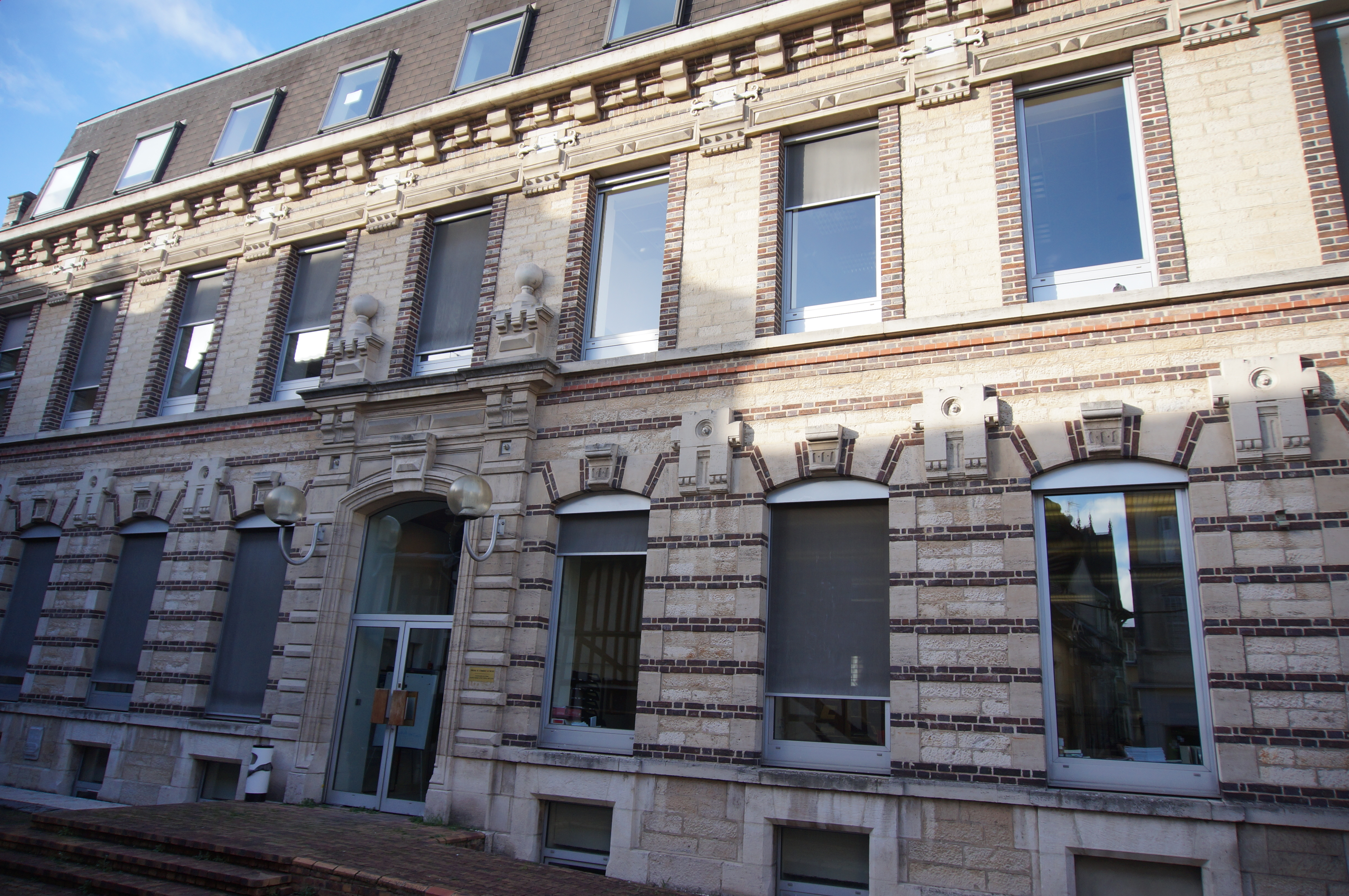 Le Tribunal de Commerce de Troyes, dans l'Aube.